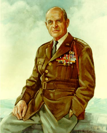 Lizens: US-PD